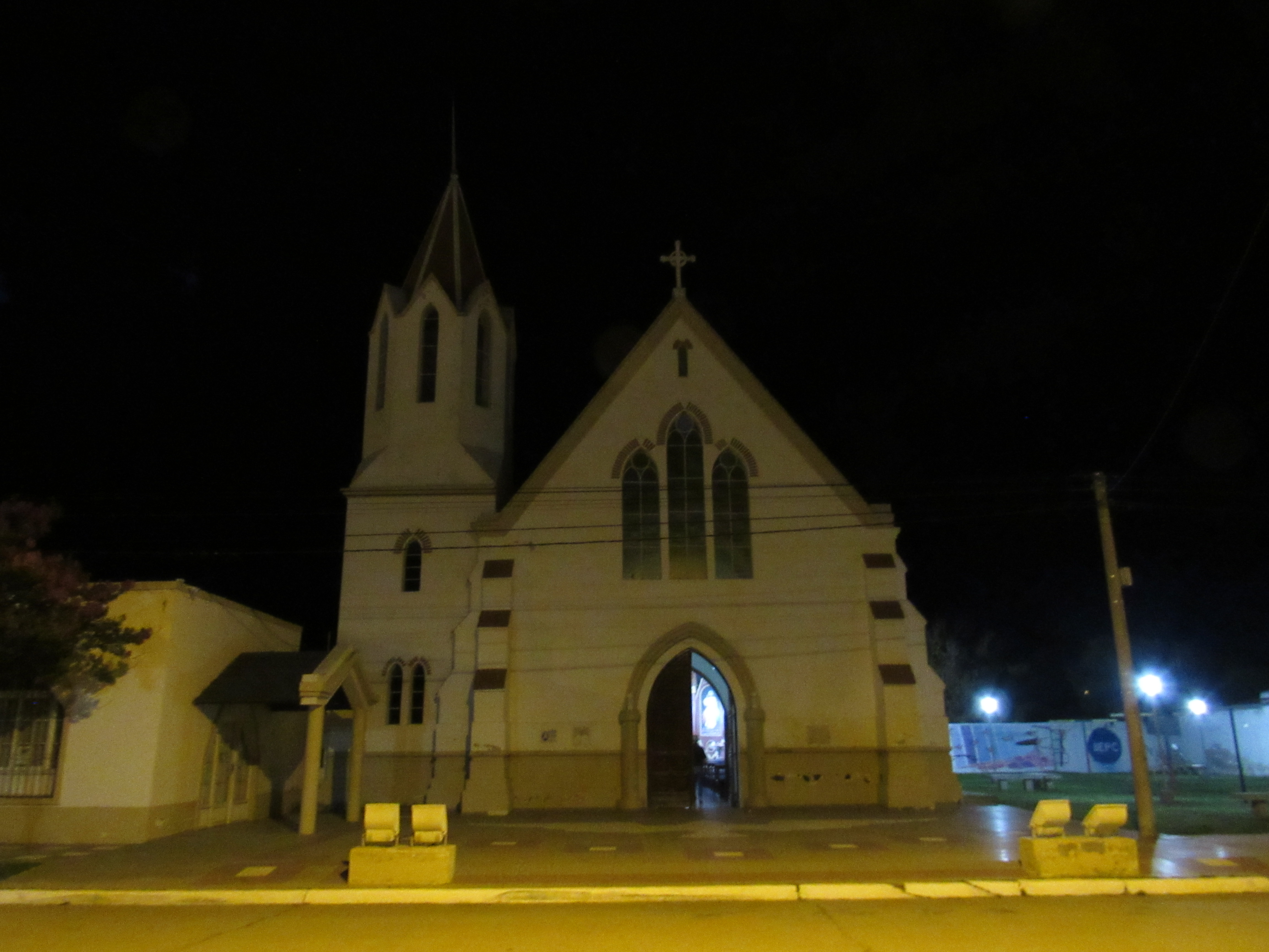 Parroquia Nuestra Señora del Carmen de Huinca Renancó, desde la Plaza San Martín